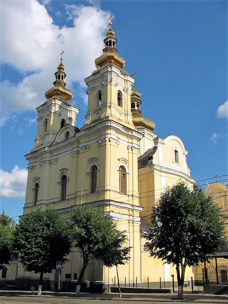 Вінниця. Колишній костел монастиря домініканців (пам`ятка архітектури, 1758 рік). Монастир було закрито в 1831. До 1991 костел використовувався як зал органної музики. Зараз - Свято-Преображенський Кафедральний собор.